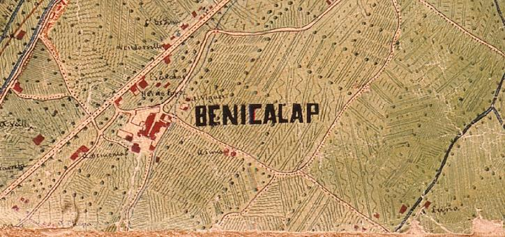 Benicalap el 1883 (el nord està a la dreta).